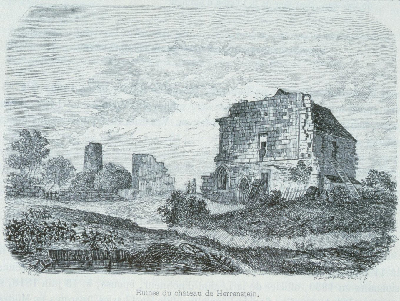 Abbildung der elsässischen Burg Herrenstein aus dem 19. Jahrhundert